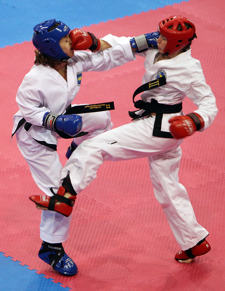 Монгол: Нүүр болон цээжны хэсэгт цохисноороо оноо авдаг бөгөөд нуруу болон ар хэсэгт цохивол алдаа авдаг.